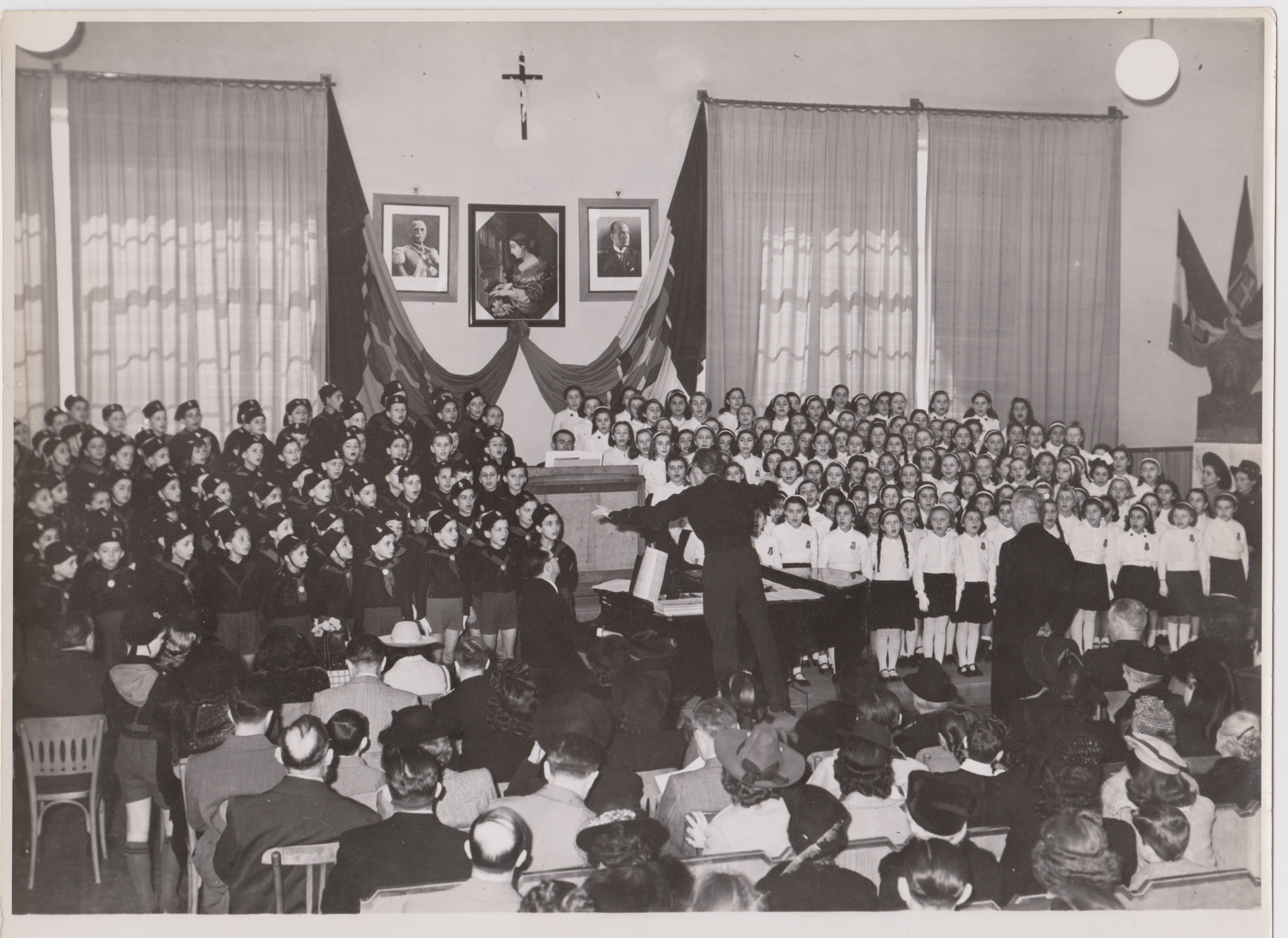 Lorenzo de Paolis dirige coro alunni scuole via Gentilino - Milano